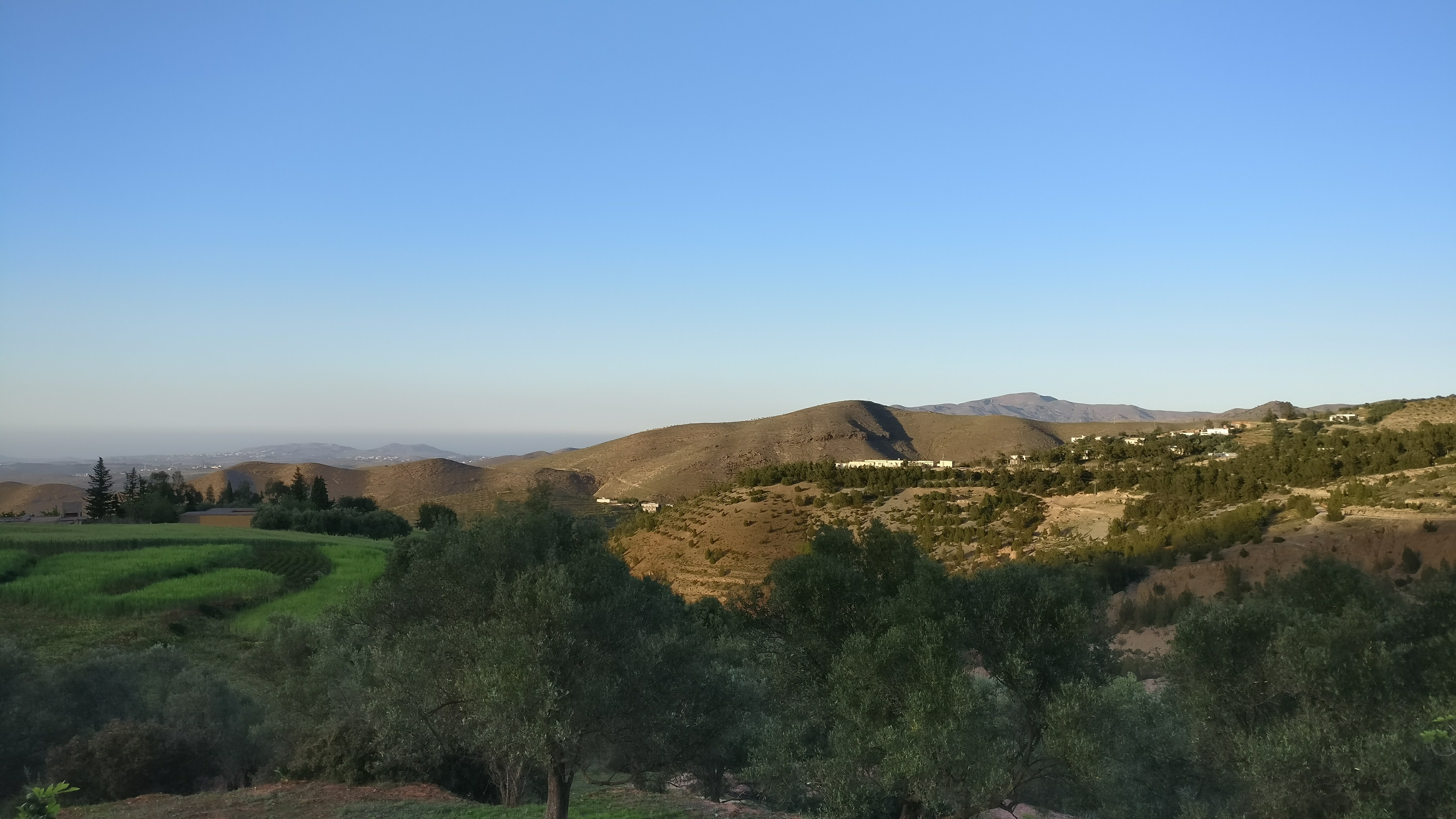 Ce village fait partie des Aït Touzine, faction Igharbiyen